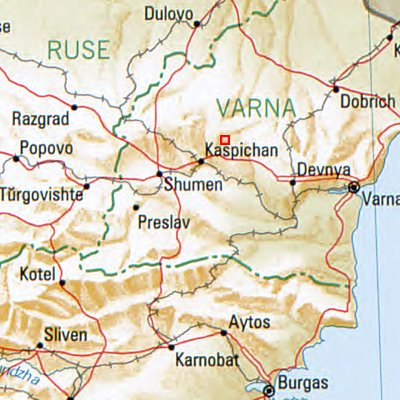 Pliska - Lage des Ortes in Bulgarien